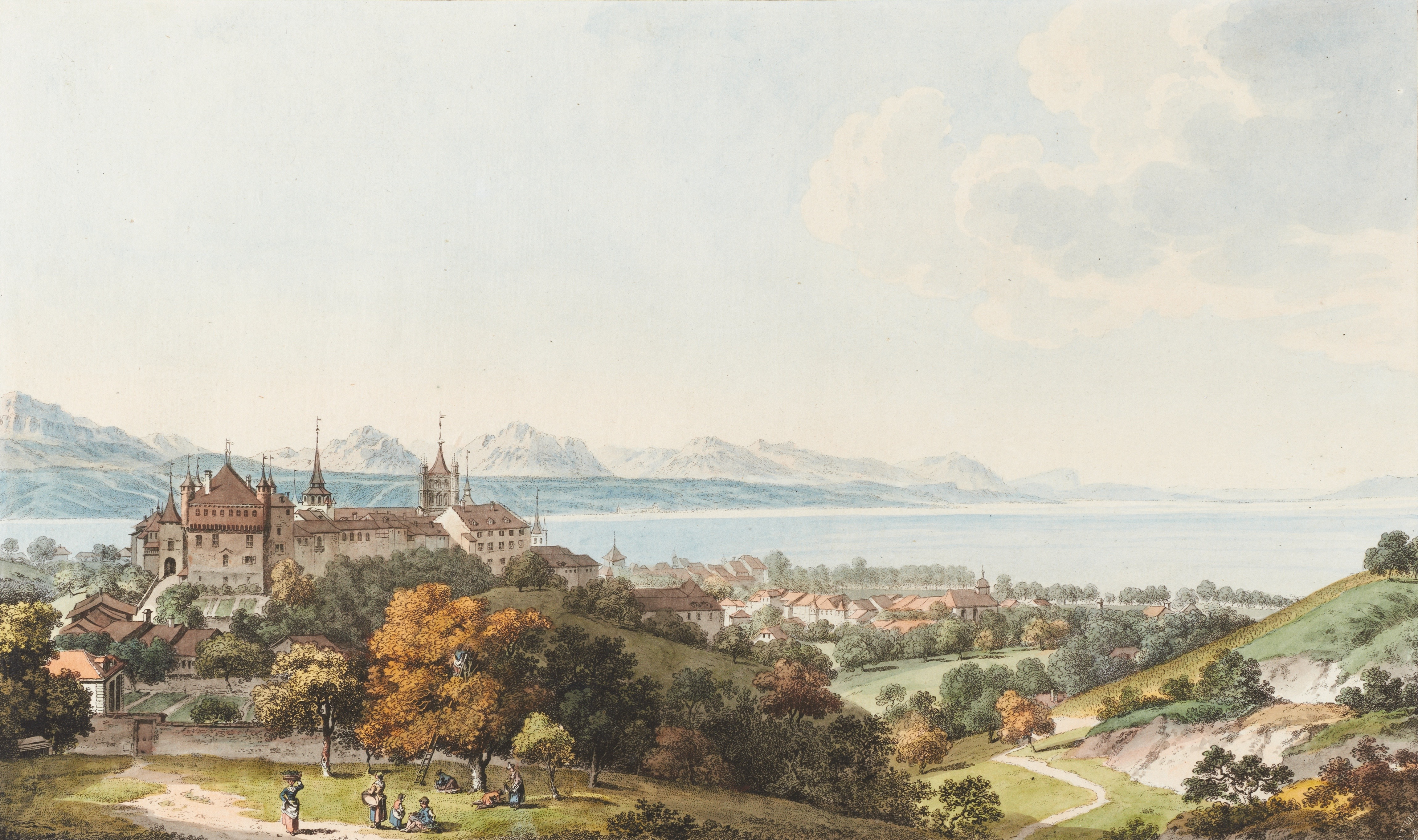 Johann Ludwig Aberli (Zeichner)/Balthasar Anton Dunker (Stecher): Lausanne, zwischen 1773 und 1775.